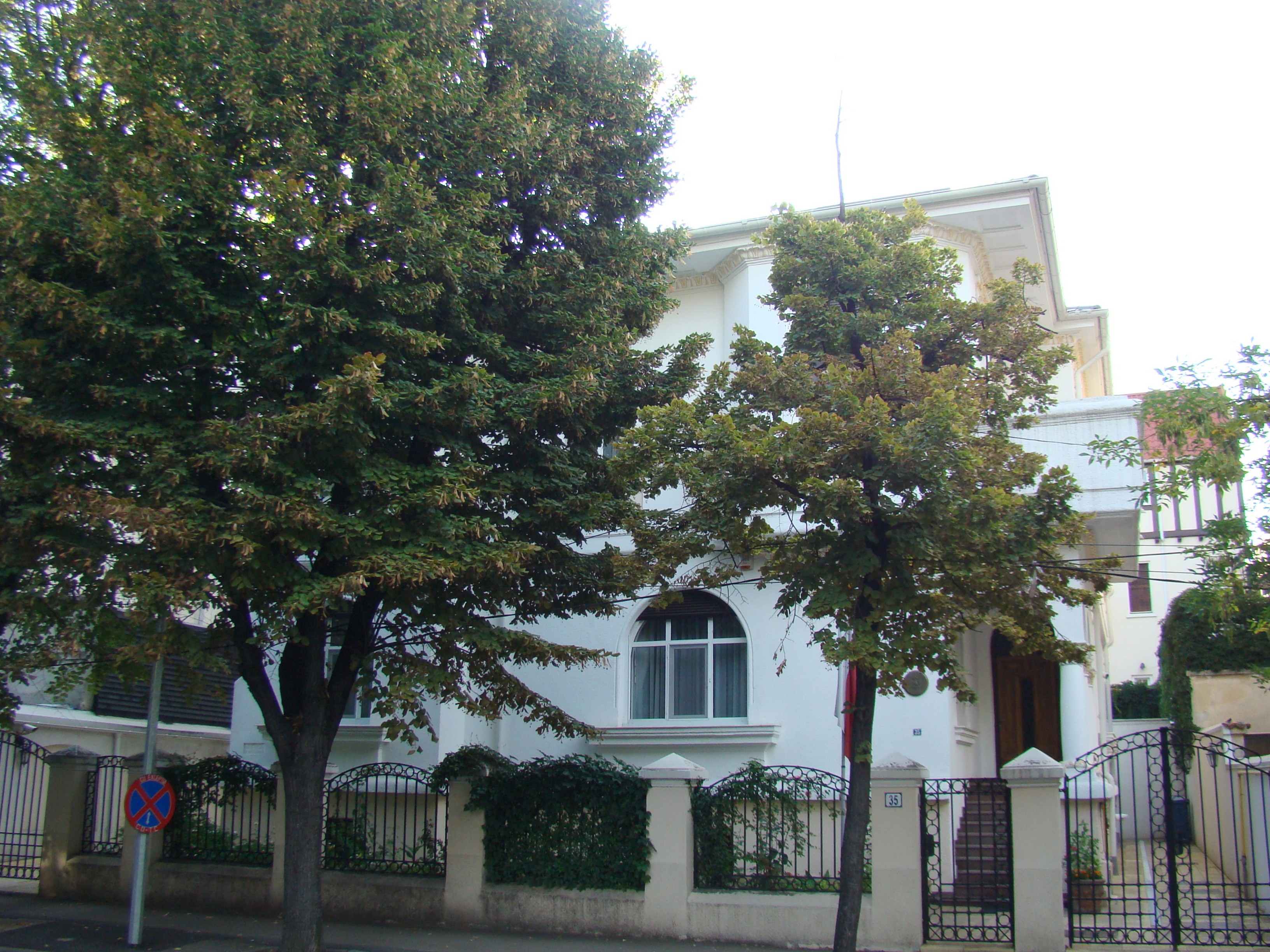 Clădire monument istoric, str. Paris, nr 35